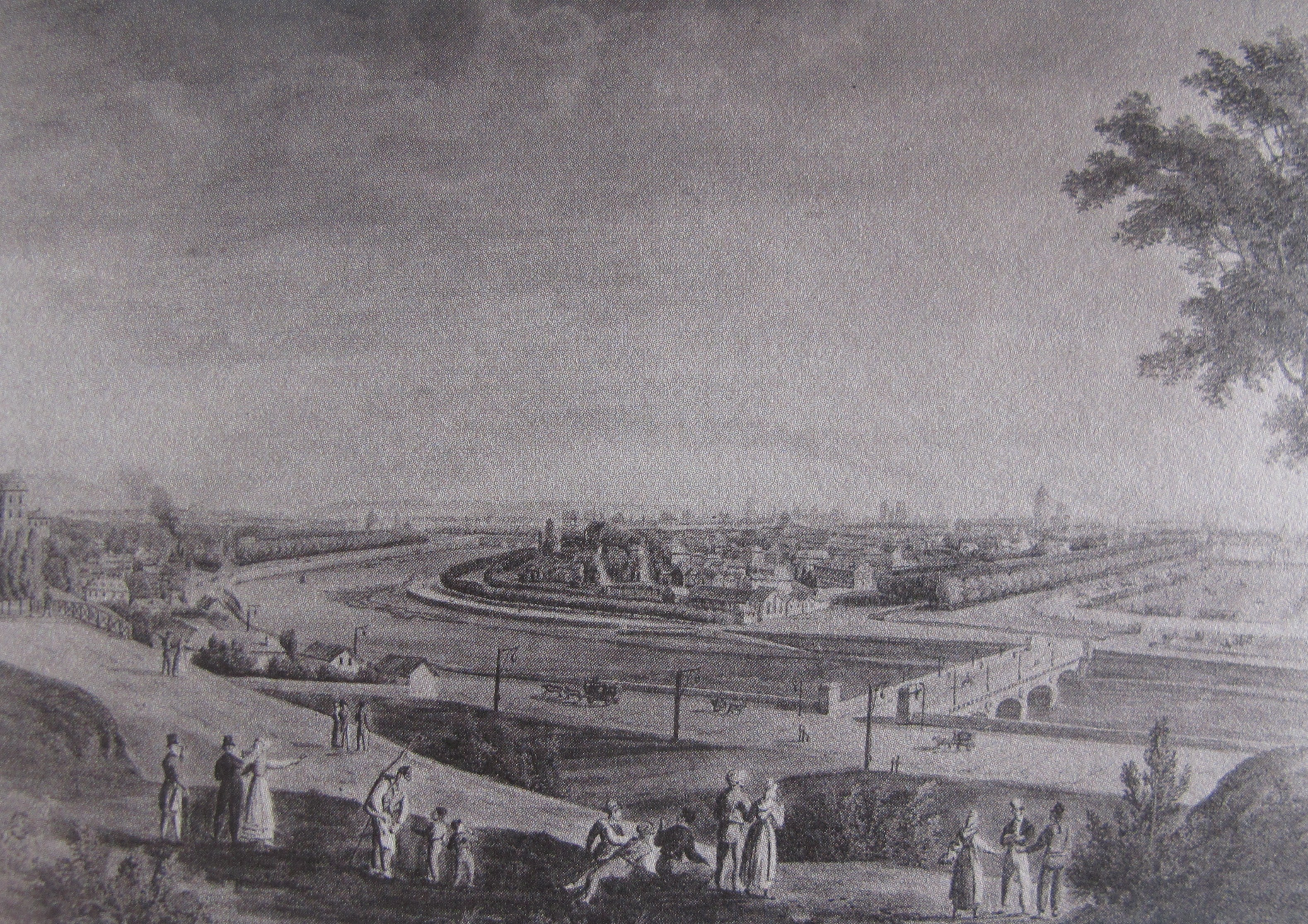 Vue de la rive gauche de Paris depuis la colline de Chaillot. Gravure anonyme du XVIIIe siècle ?.Pont d'Iéna (construit 1808-1814).